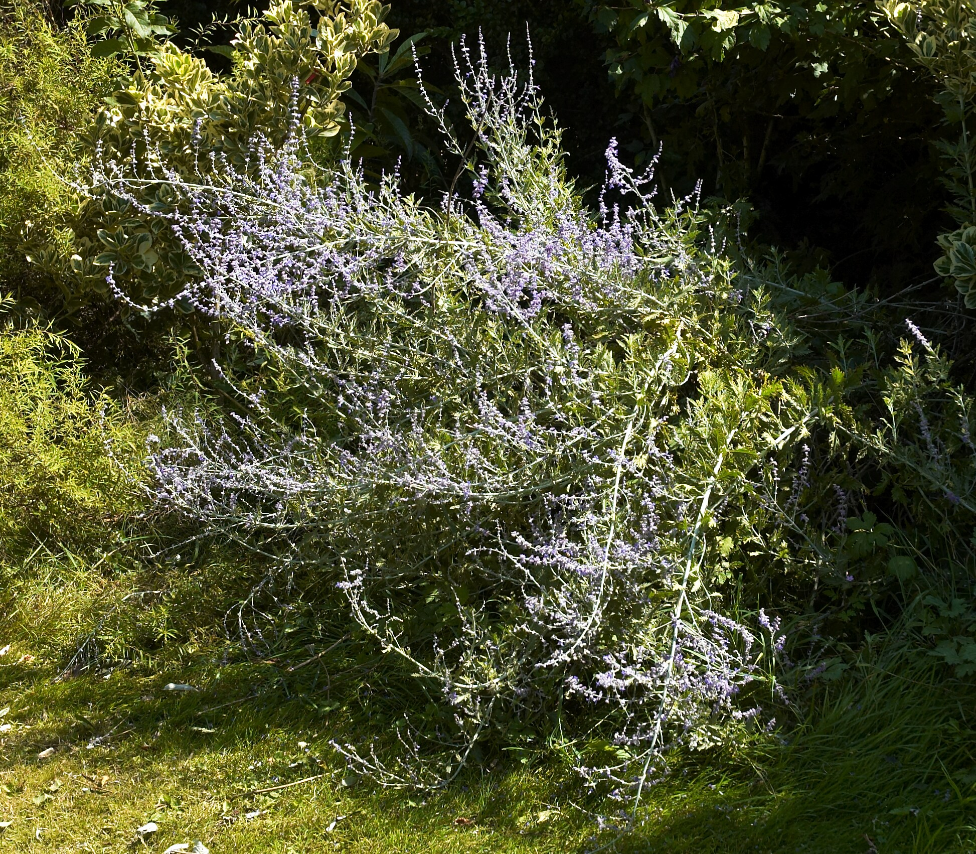 Perovskia atriplicifolia 'Blue Spire'